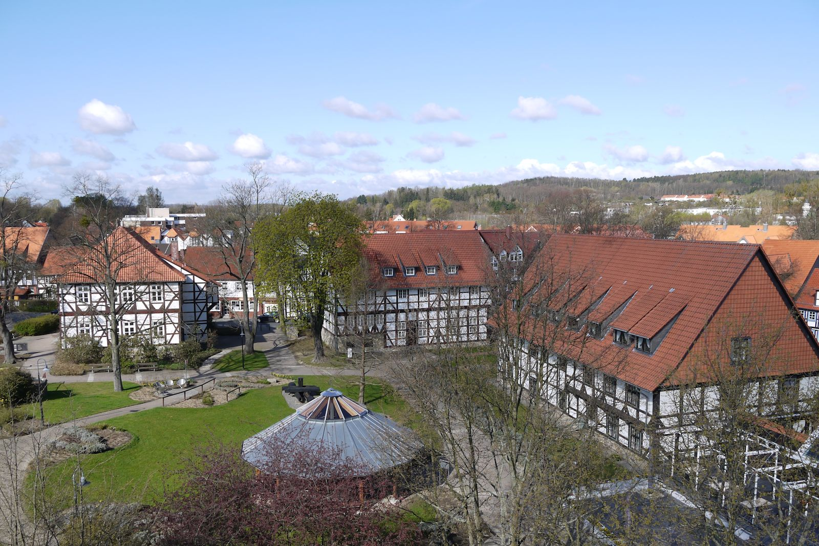 Traditionsinsel (Rosengarten) von Salzgitter-Bad. Die Gebäude von links: Tillyhaus, Kniestedter Gutshaus, Garßenhof und im Vordergrund der Gradierpavillion